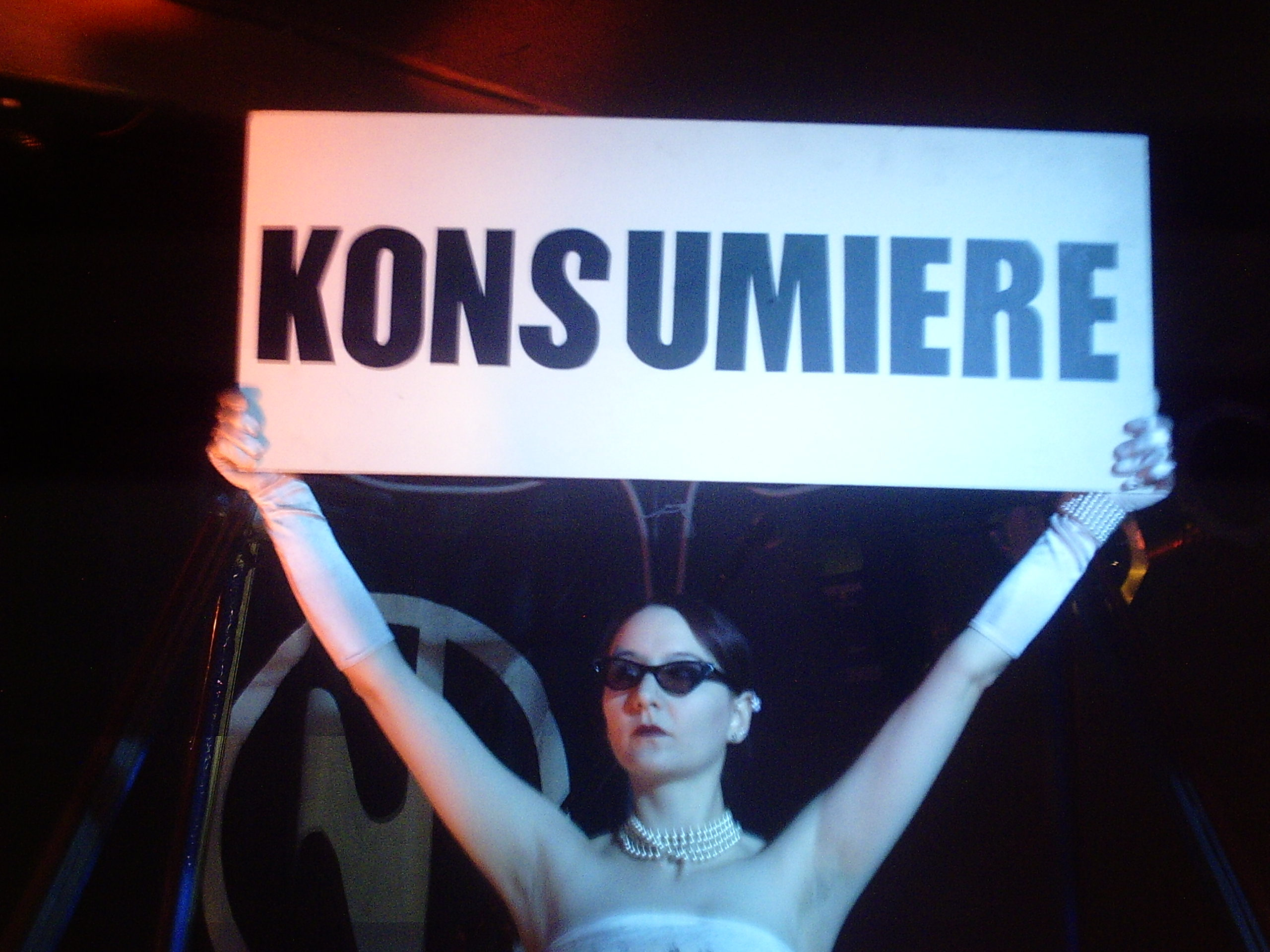 Bandphoto Welle Erdball (Venus)